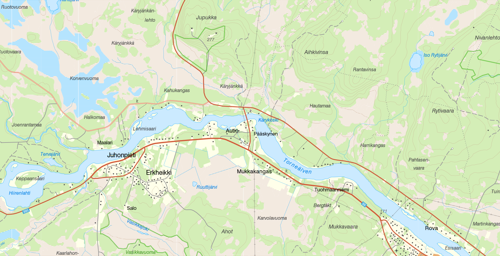 Orten Autio. Bakgrundskarta från Lantmäteriet, skala 1:30 236.